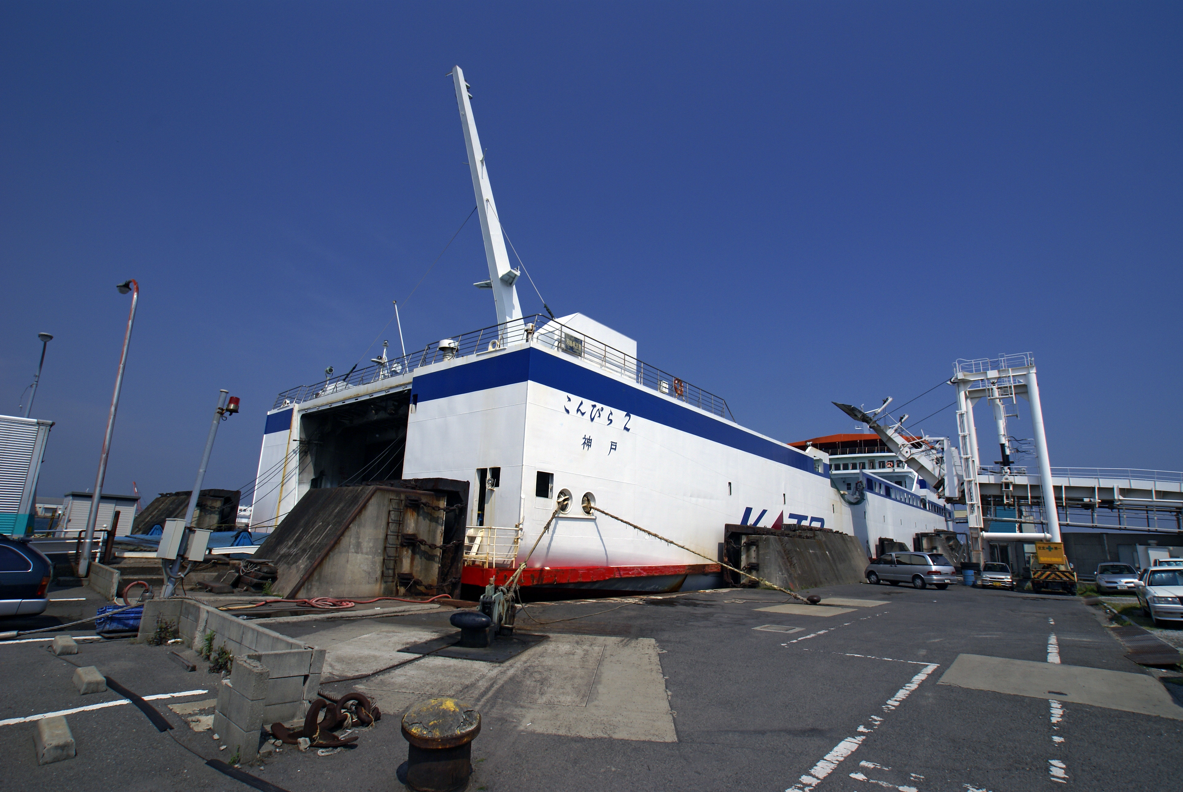 Ferry "Konpira2"